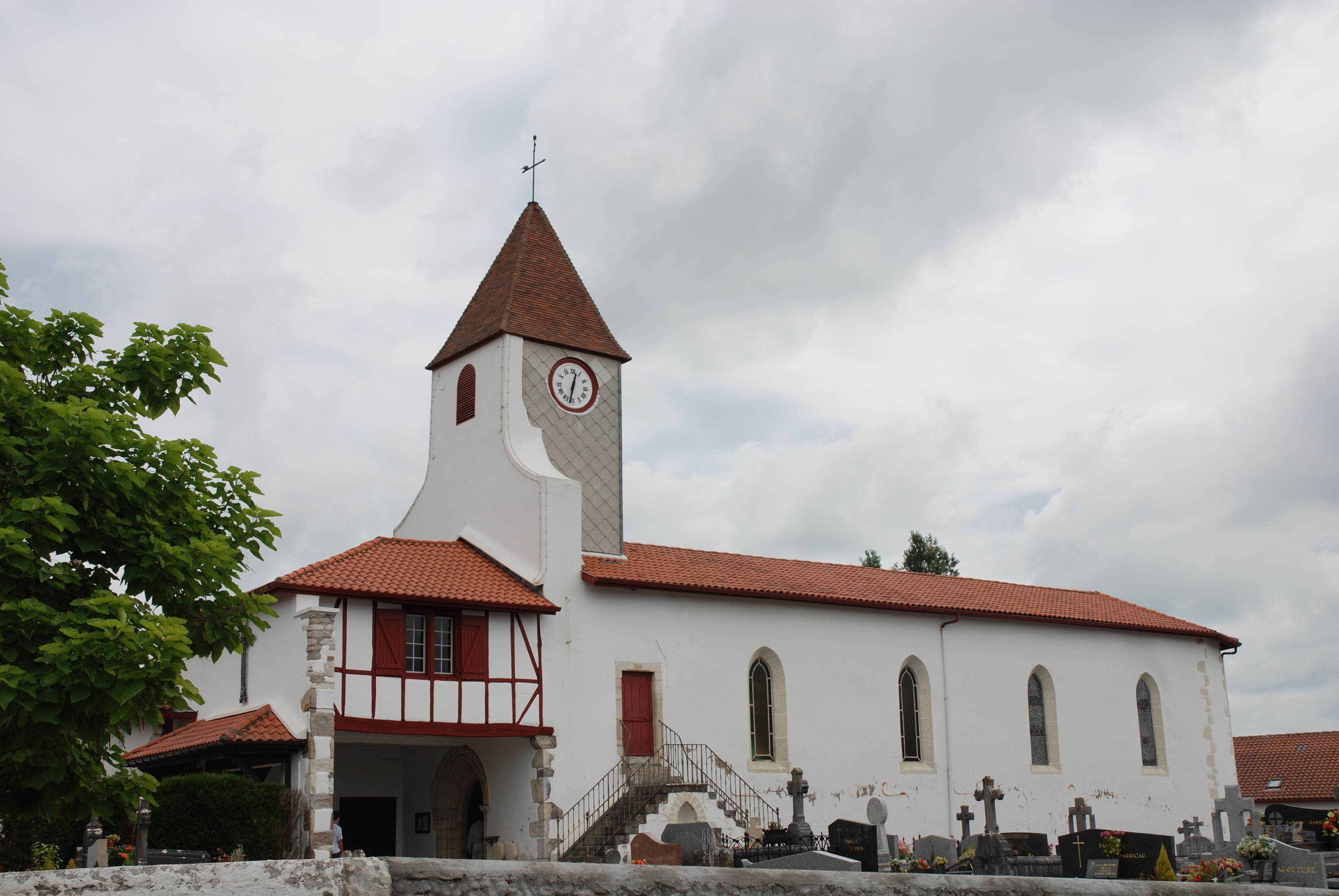 Urcuit, l'église Saint-Etienne